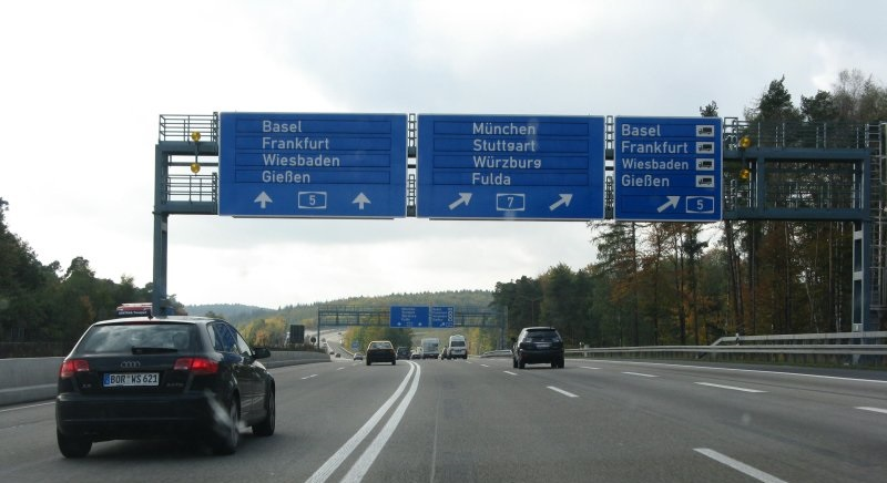 Abfahrt nach München,Stuttgart,Würzburg,Fulda